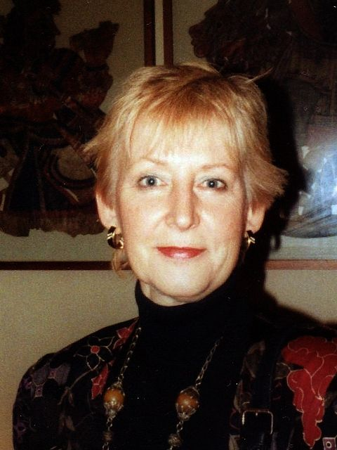 Porträt Helga Kutz-Bauer